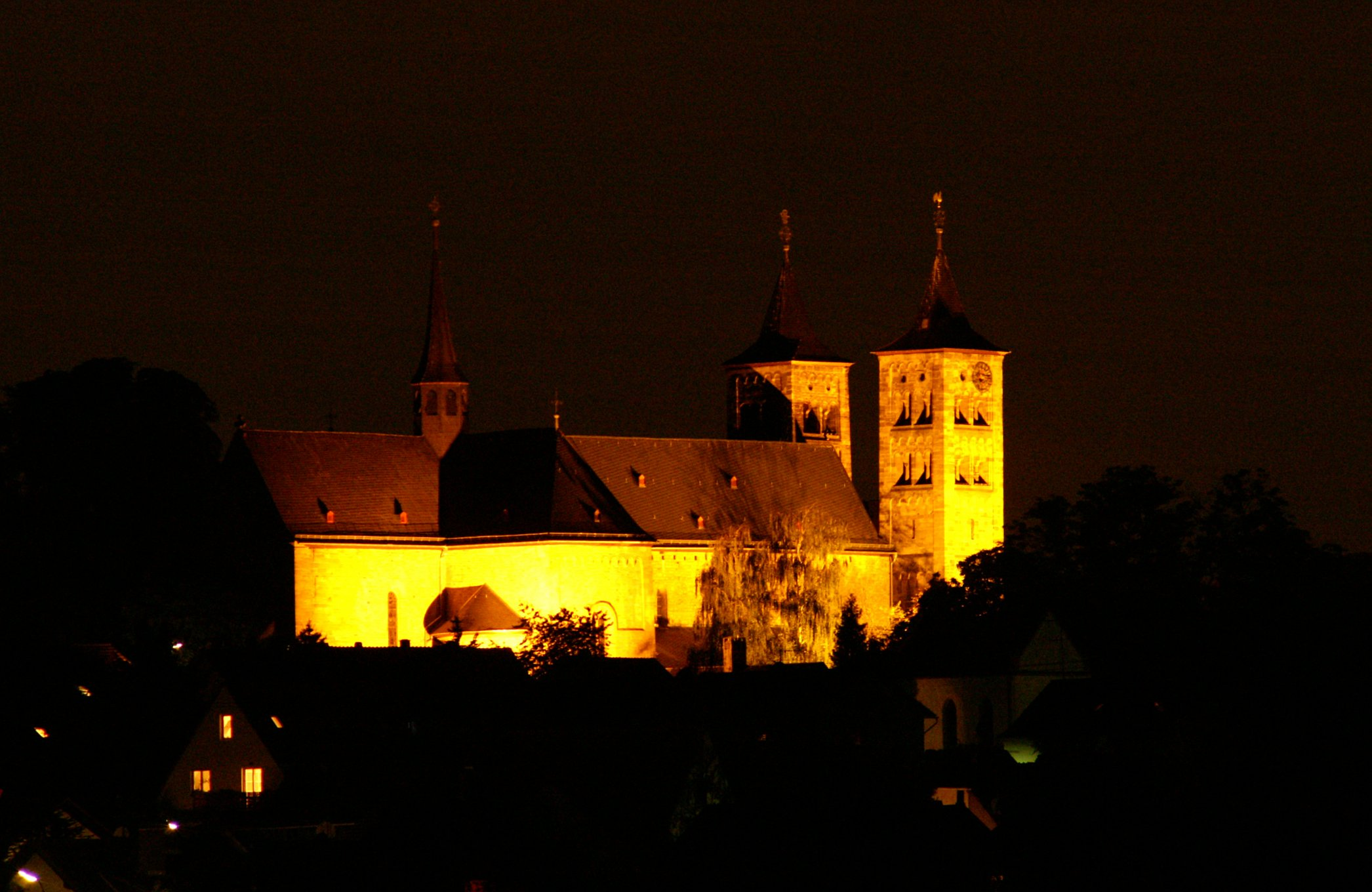 Die Basilika in Niddatal-Ilbenstadt - der "Dom der Wetterau" in einer Nachtaufnahme.